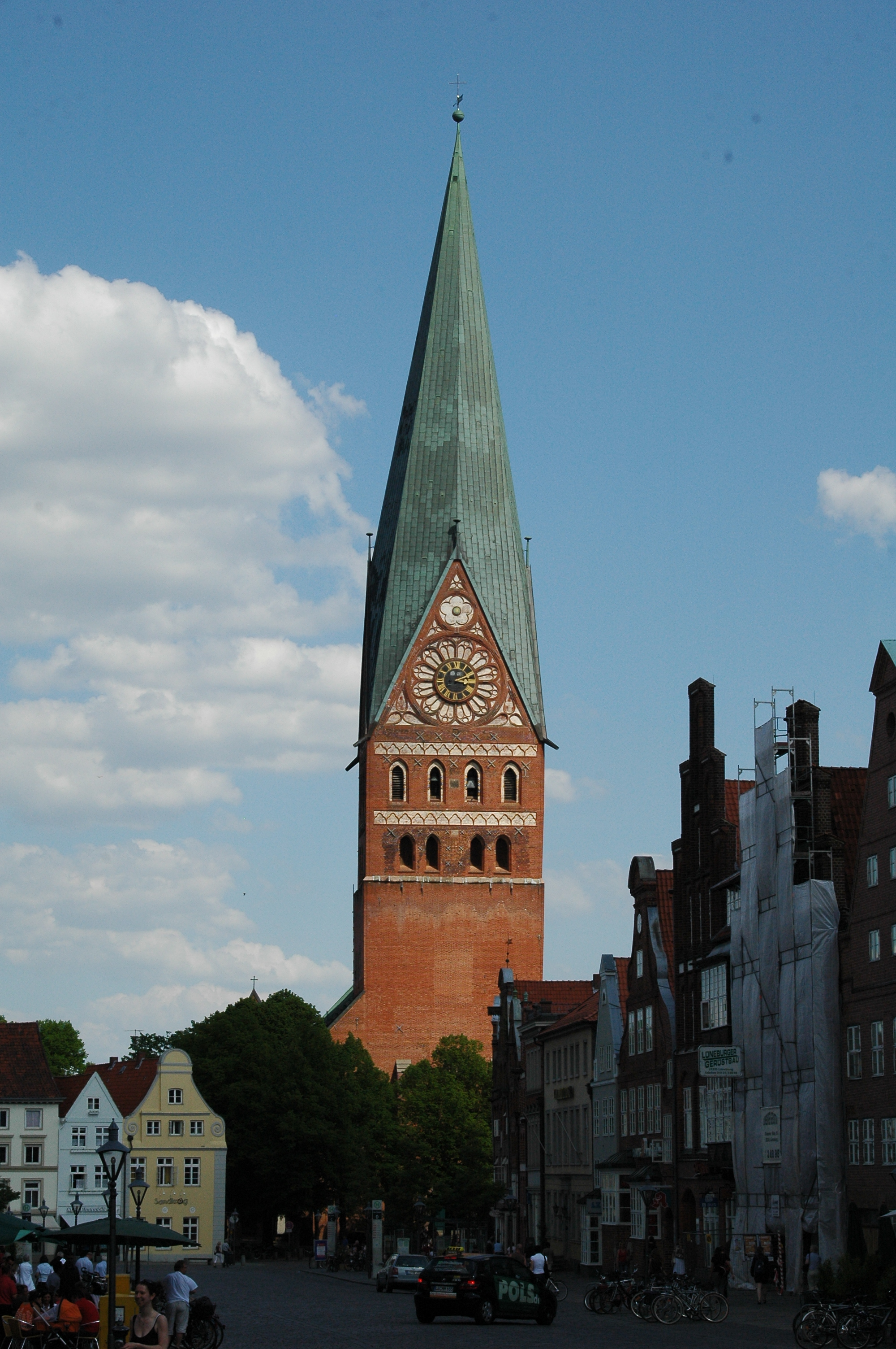 Lüneburg, Johannis-Kirche